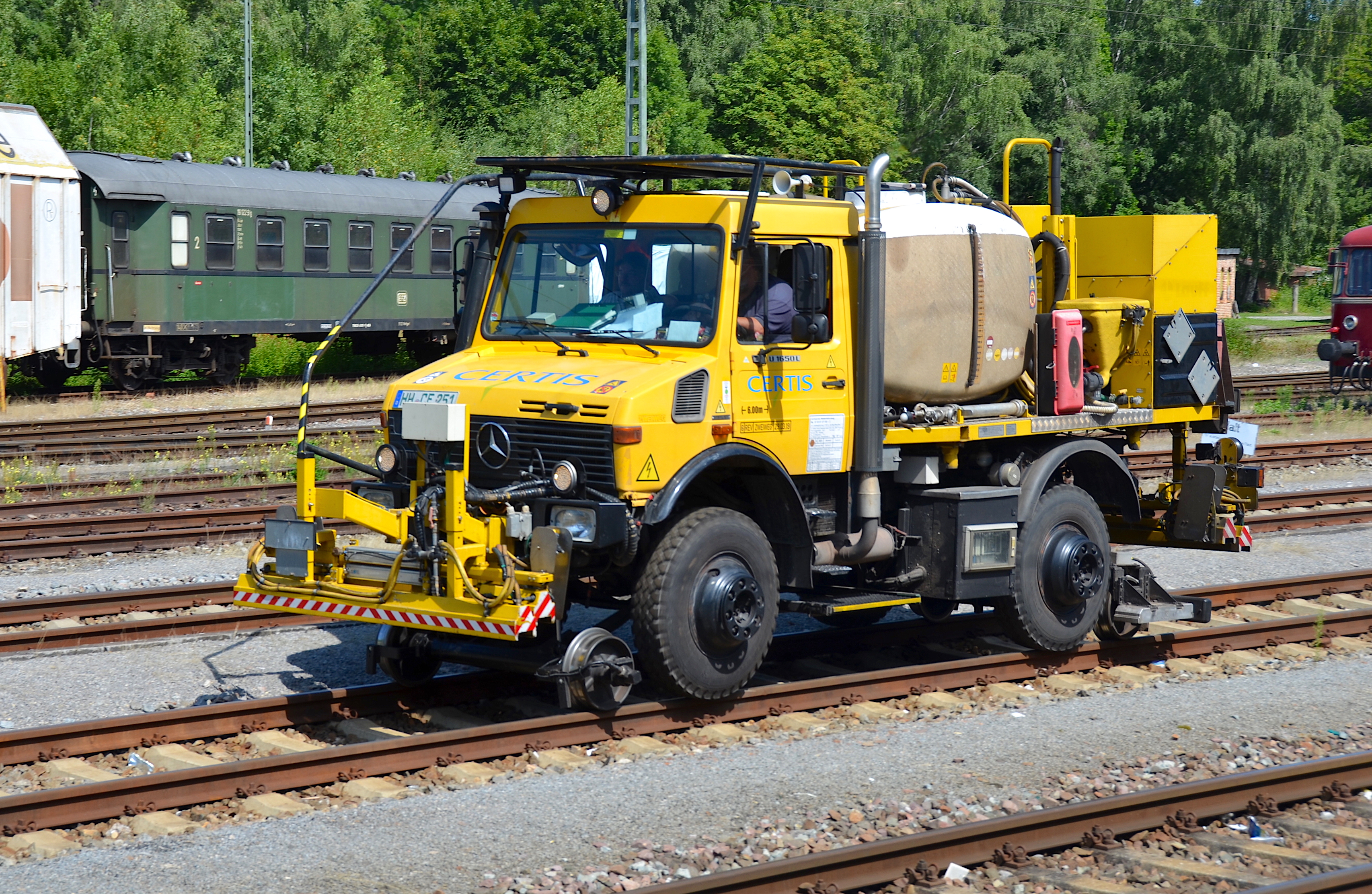 Certis Unimog, Zweiwegefahrzeug zur Vegetatiosbekämpfung (Bahnhof Rottweil)